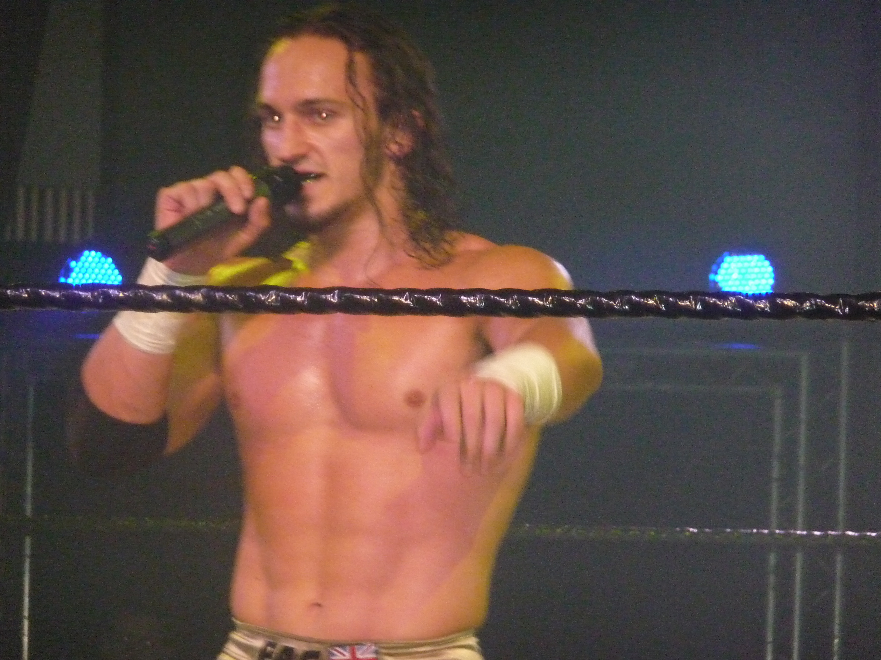 pac